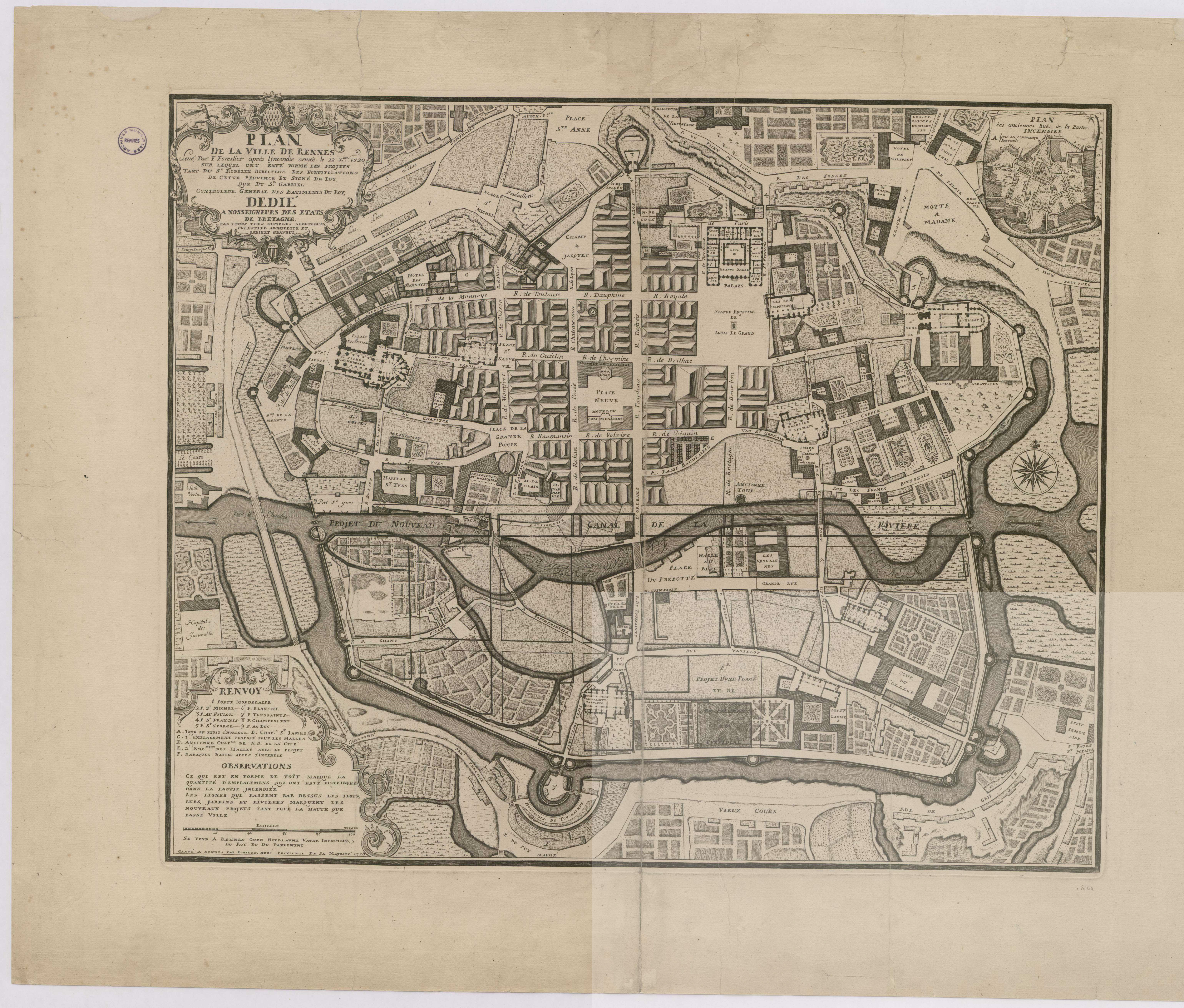 Plan de la ville de Rennes levé par F. Forestier après l'incendie arrivé le 22 décembre 1720, sur lequel ont été formés les projets tant du Sieur Robelin directeur des fortifications de cette province et signés de lui, que du Sieur Gabriel contrôleur général des bâtiments du roi, dédié à nosseigneurs des États de Bretagne, par leurs très humbles serviteurs Forestier architecte et Robinet graveur.